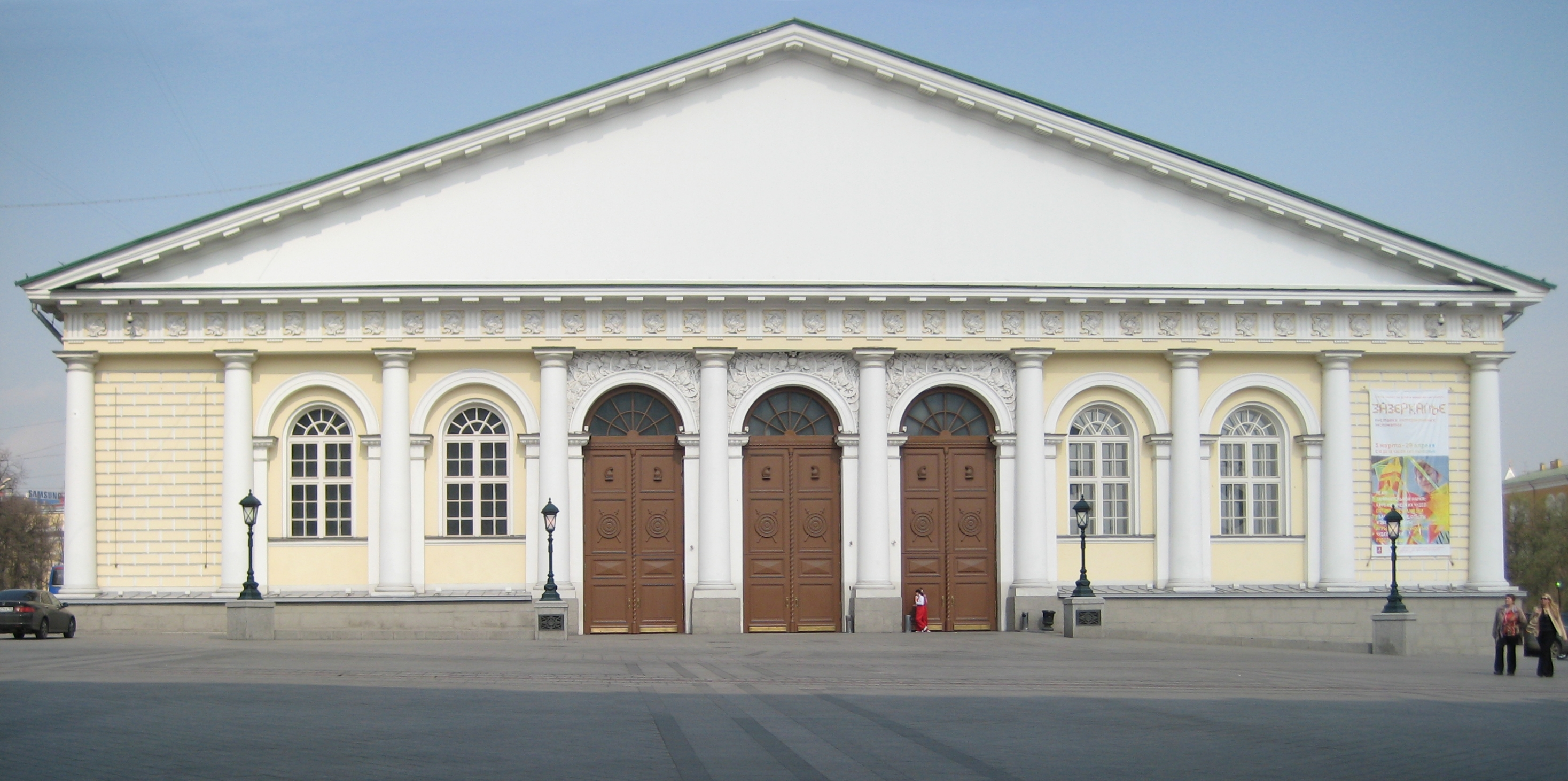 Moscow Manege